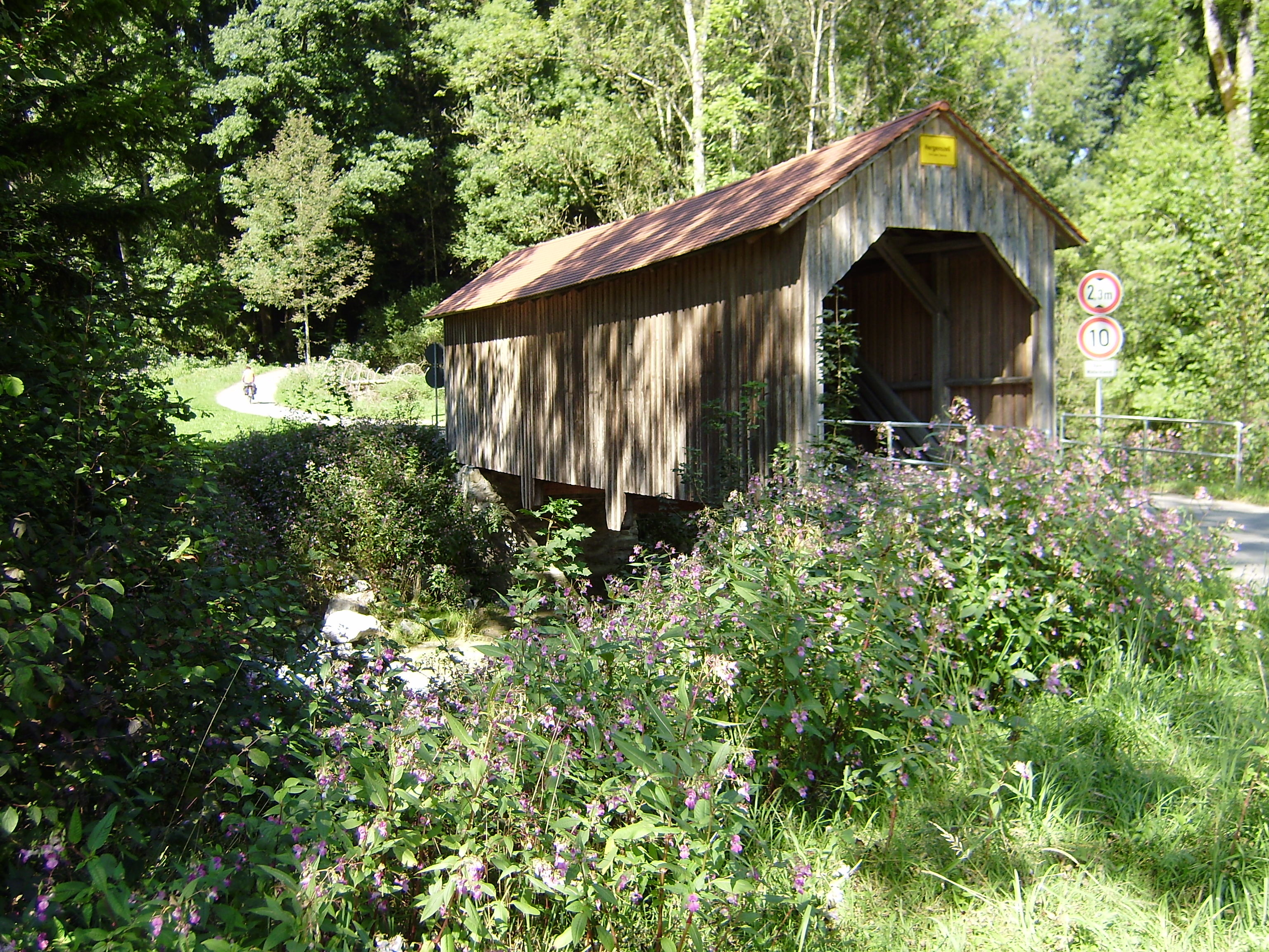 Leiblachbrücke Sigmarszell-Immen, Niederstaufener SeiteThis is a photograph of an architectural monument.